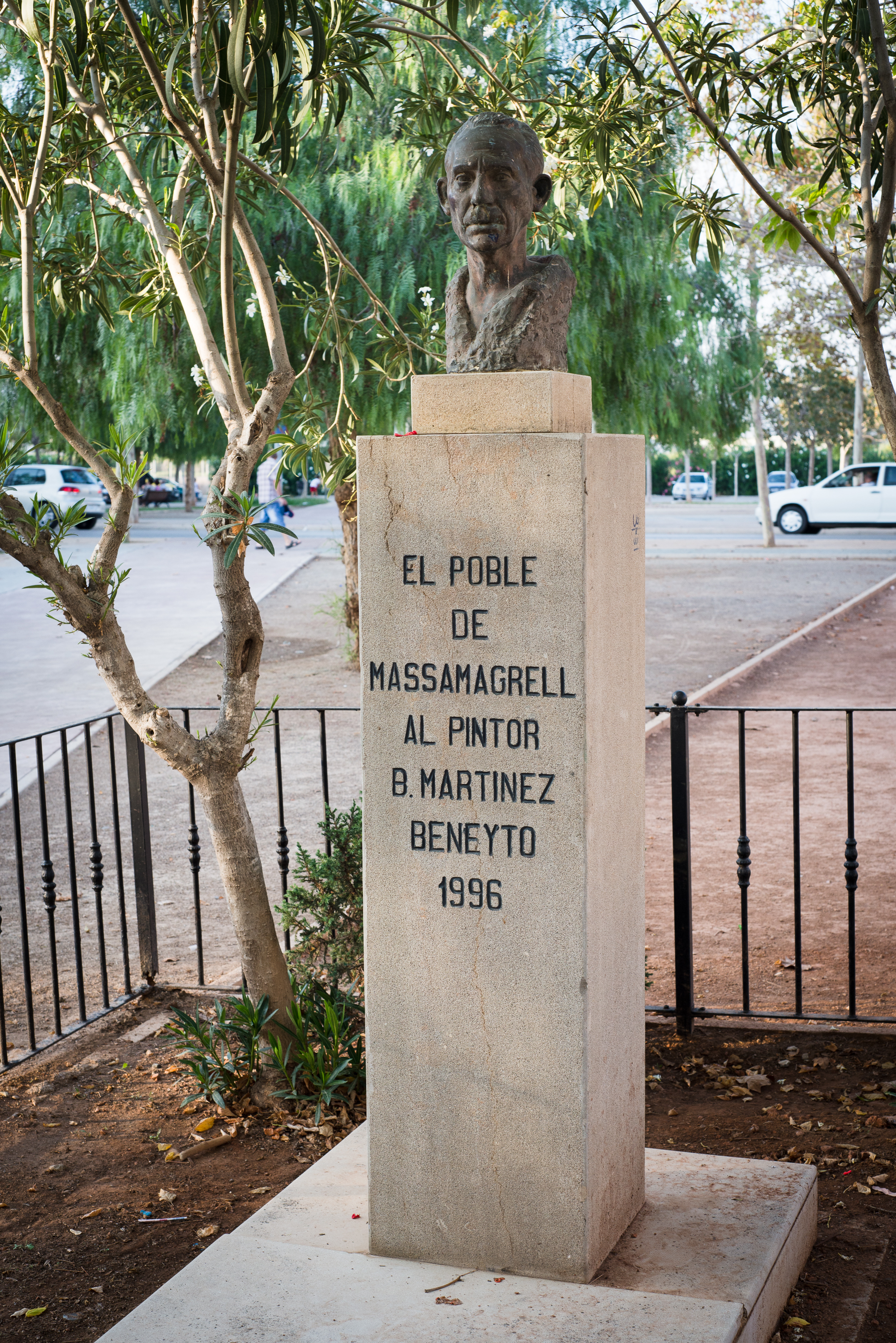 Busto en homenaje del pintor Juan Bautista Martínez Beneyto en la Plaza de su mismo nombre.